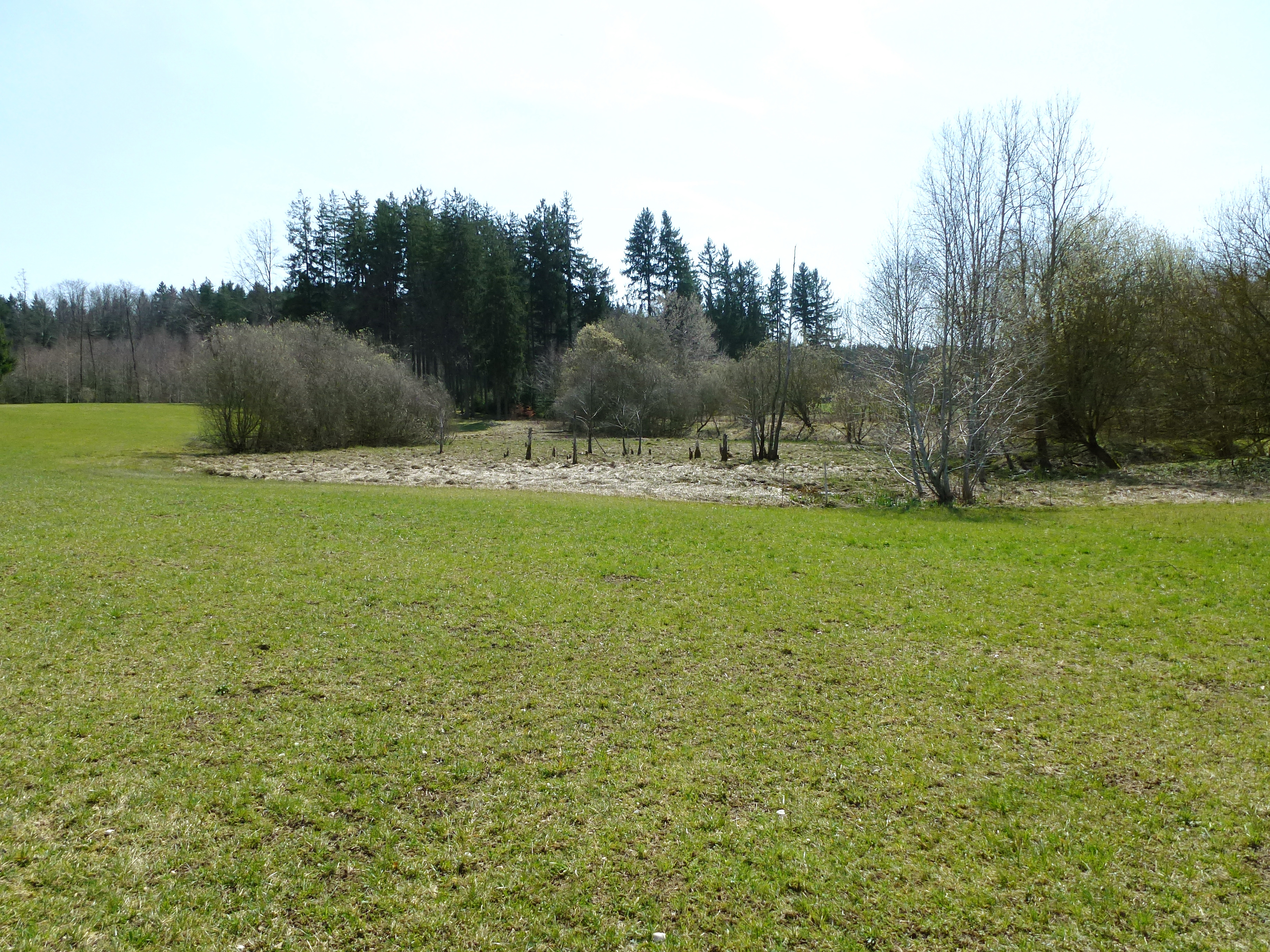 Toteisloch Ramsach (zur Gemeinde Penzing (Obb.) gehörig). Ansicht aus NNW. Der Wasserstand des bereits stark bewachsenen Toteisloches (ca. 80x60m) wird durch einen künstlich angelegten Abfluss ziemlich niedrig gehalten